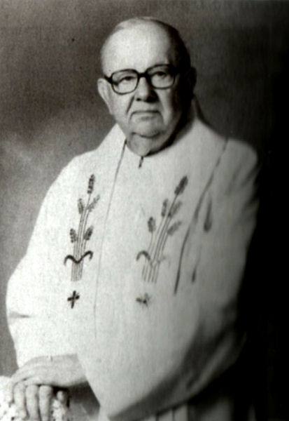 Ze Sušice